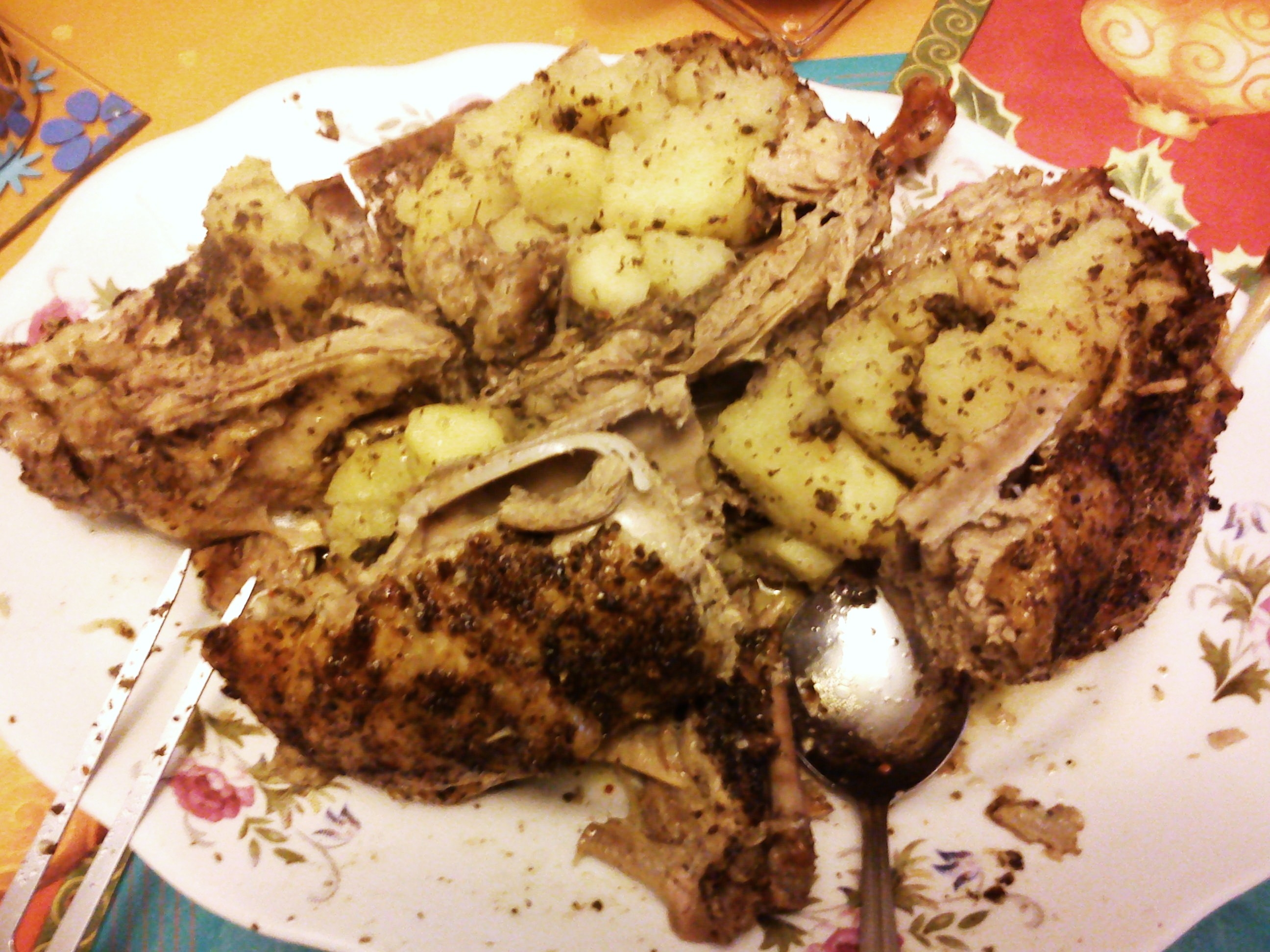 Kaczka z jabłkami - danie kuchni poznańskiej.